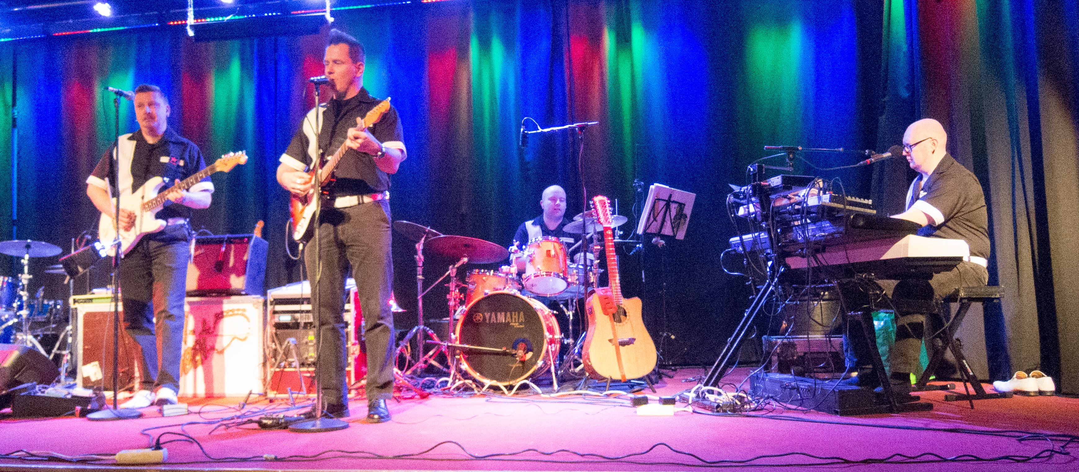 Fbi-beat suomalainen yhtye